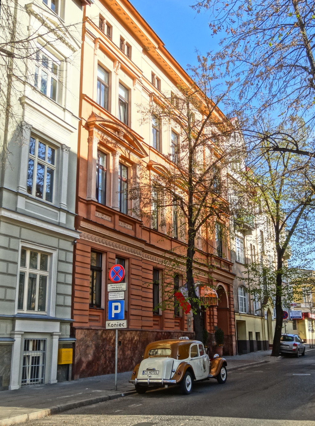 Hotel Bohema w Bydgoszczy *****, w kamienicy przy ul. Konarskiego (1877)